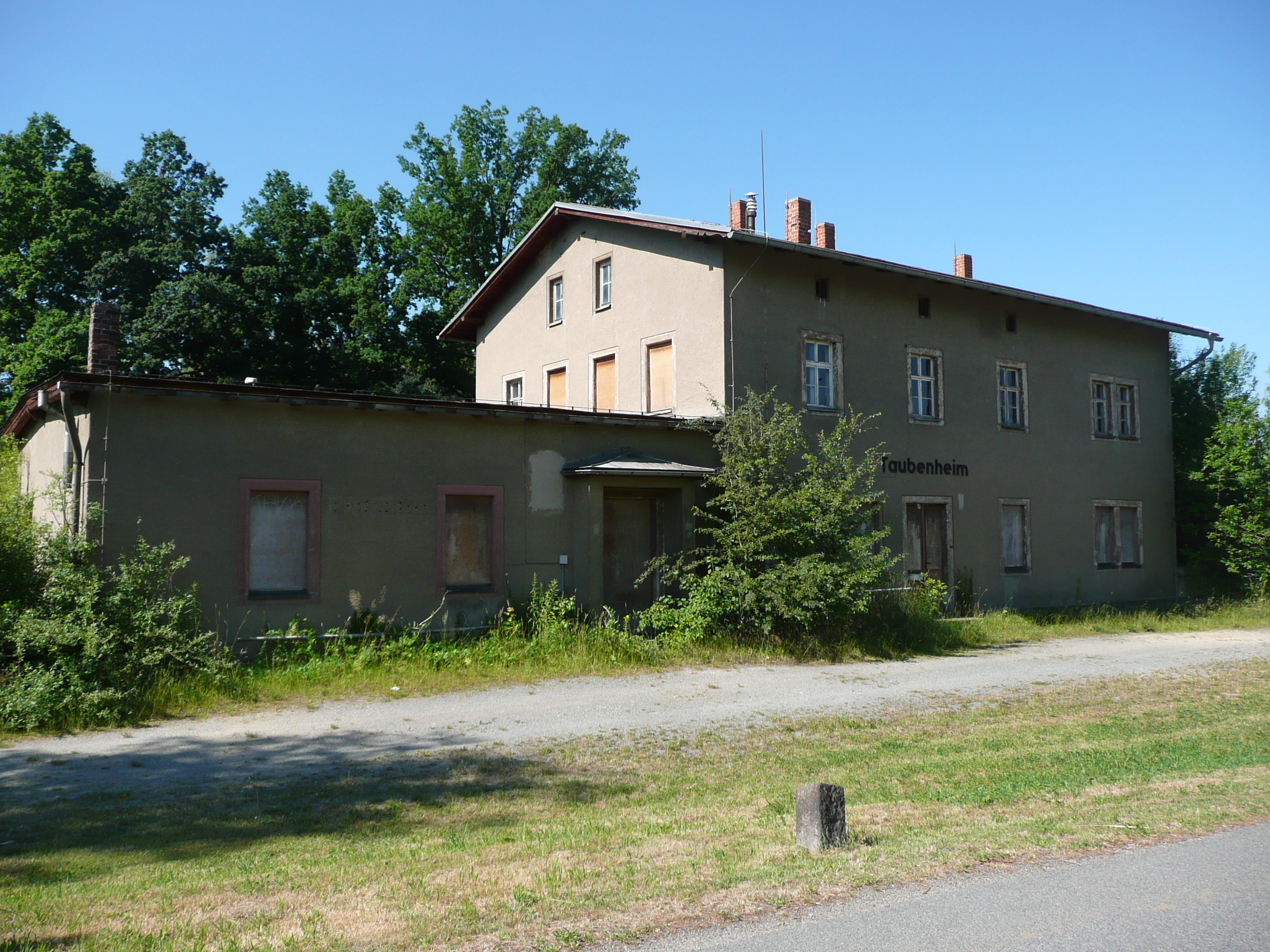 Ansicht des Bahnhofs Taubenheim von der Schmalspurseite aus